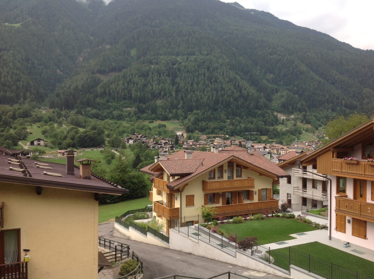 Panorama di Bocenago (Trentino-Alto Adige) visto dal balcone di un appartamento. In primo piano alcuni appartamenti, sullo sfondo le montagne che racchiudono la Val Rendena.